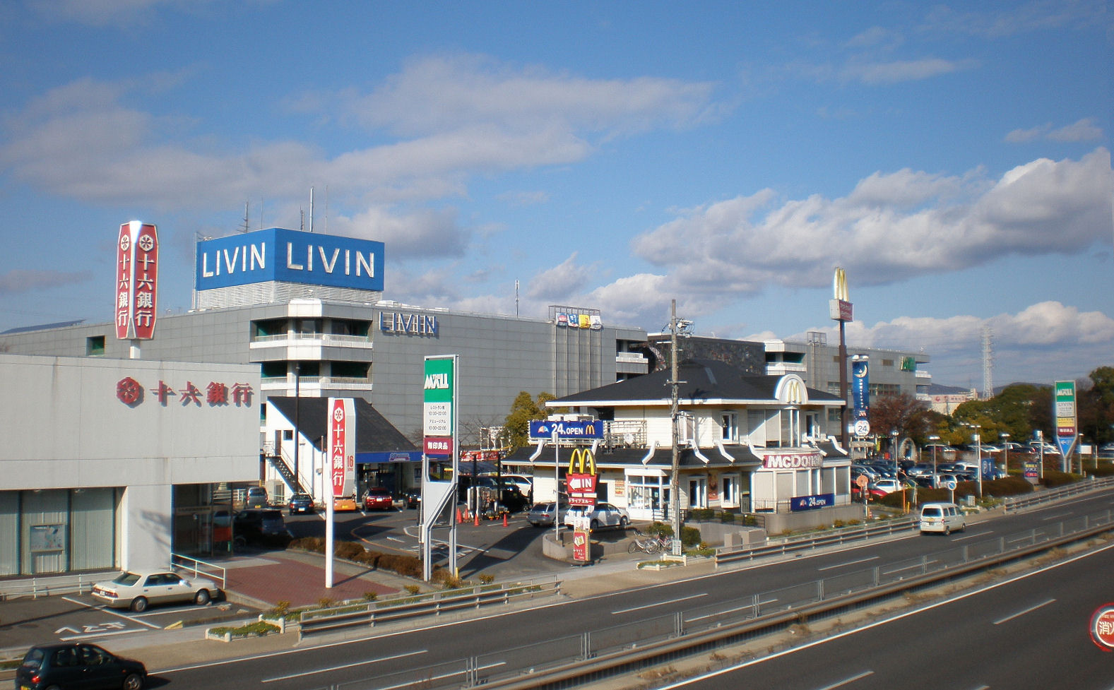 愛知県春日井市にあるザ・モール春日井